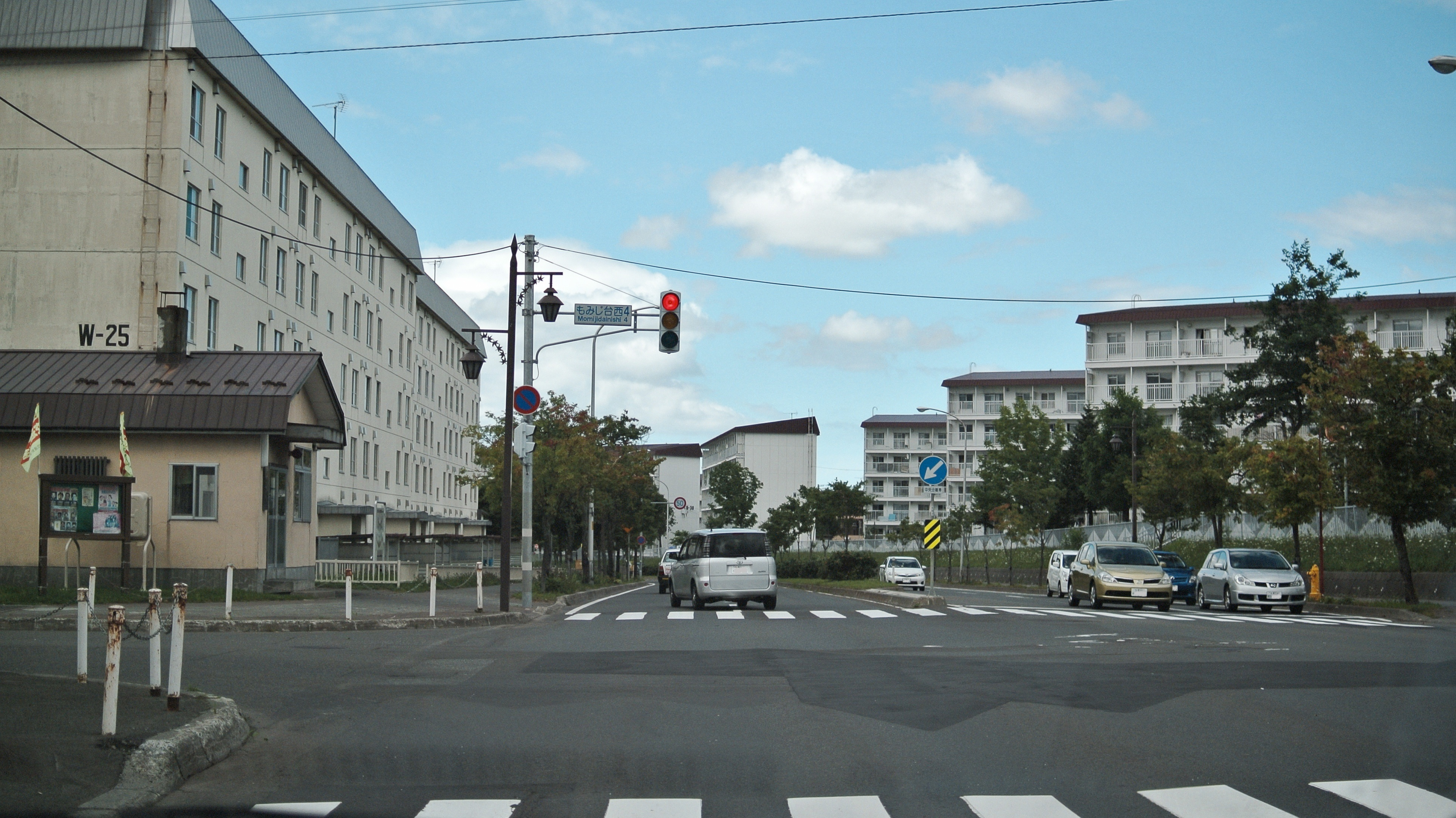 もみじ台西（札幌市厚別区）